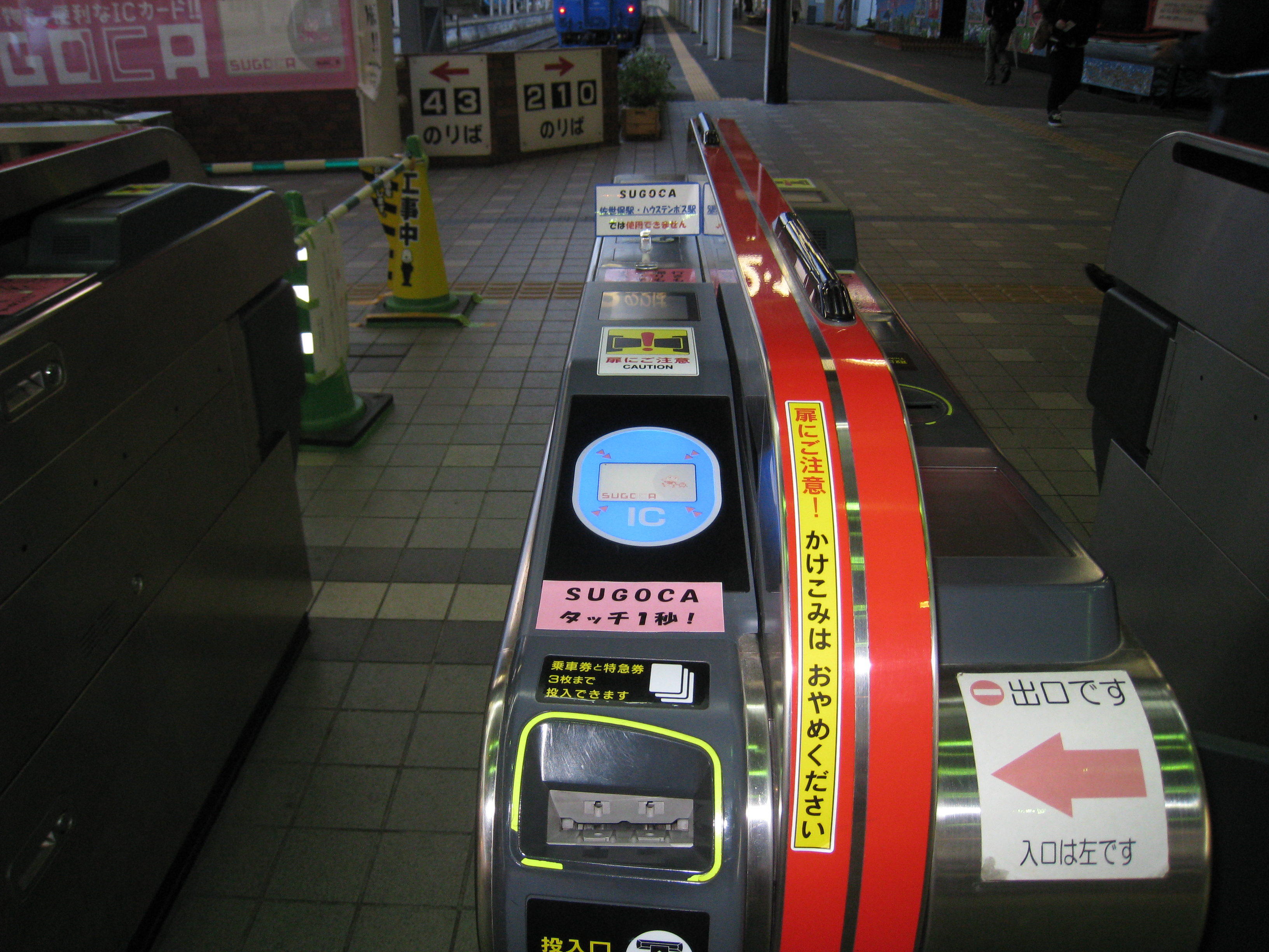 長崎駅撮影